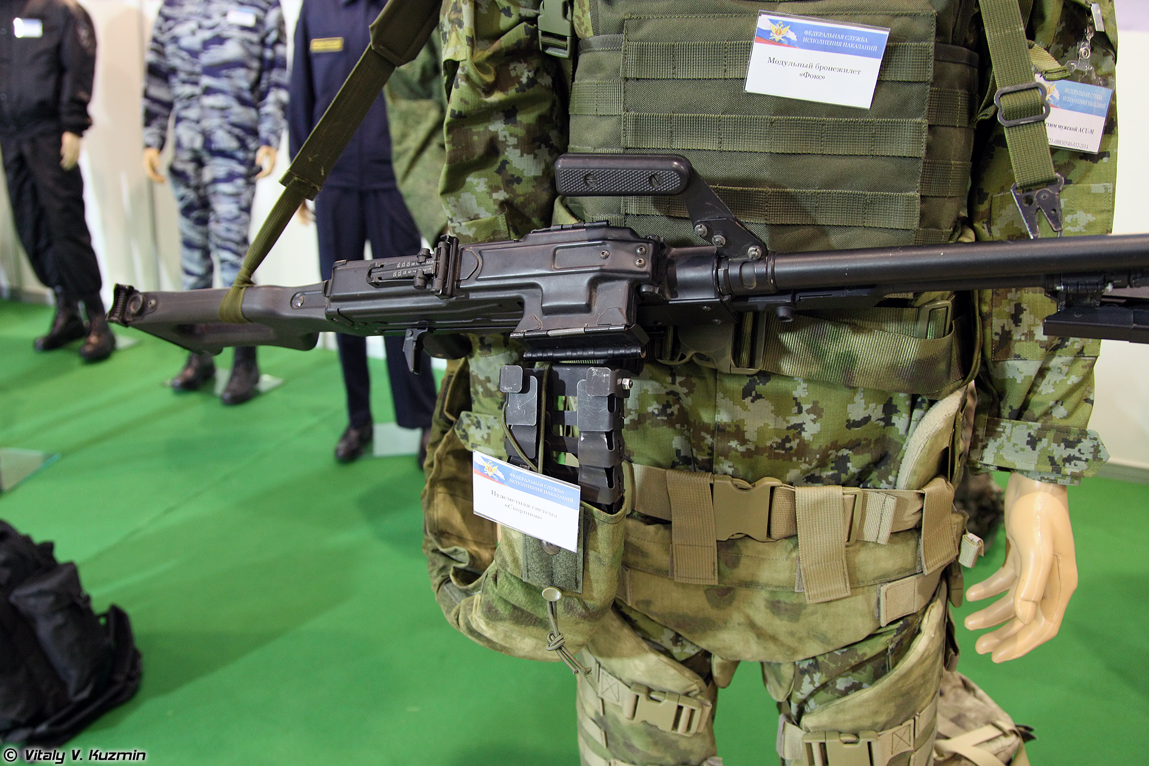 Пулеметная система Скорпион